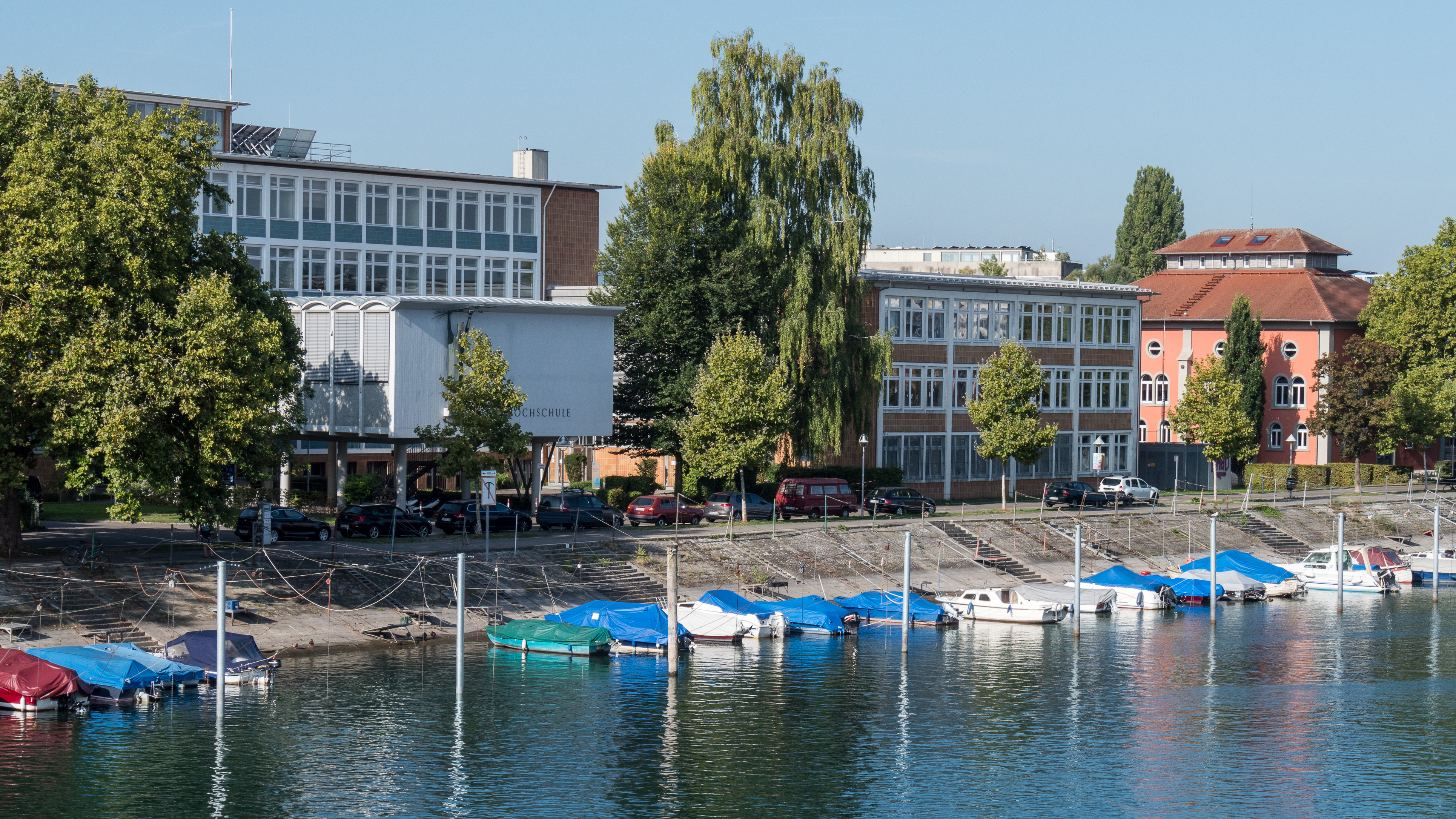 Gebäude der "Hochschule Konstanz, Technik, Wirtschaft und Gestaltung" direkt am Rhein. Man könnte auch mit dem Boot kommen....